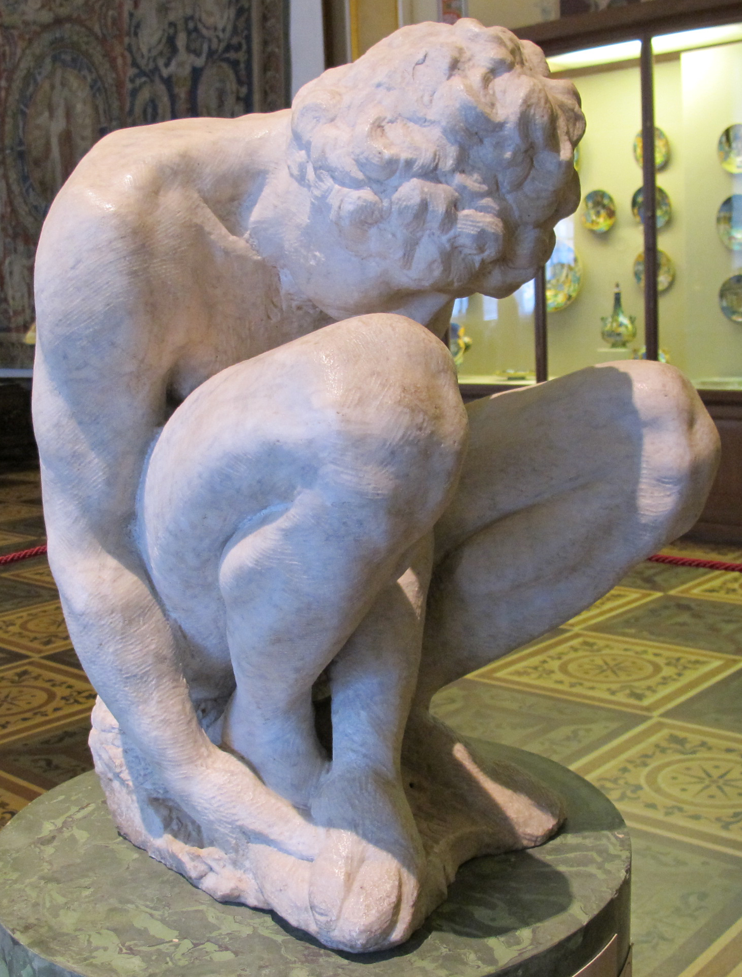 Michelangelo, ragazzo accovacciato, dalla sagrestia nuova (forse)